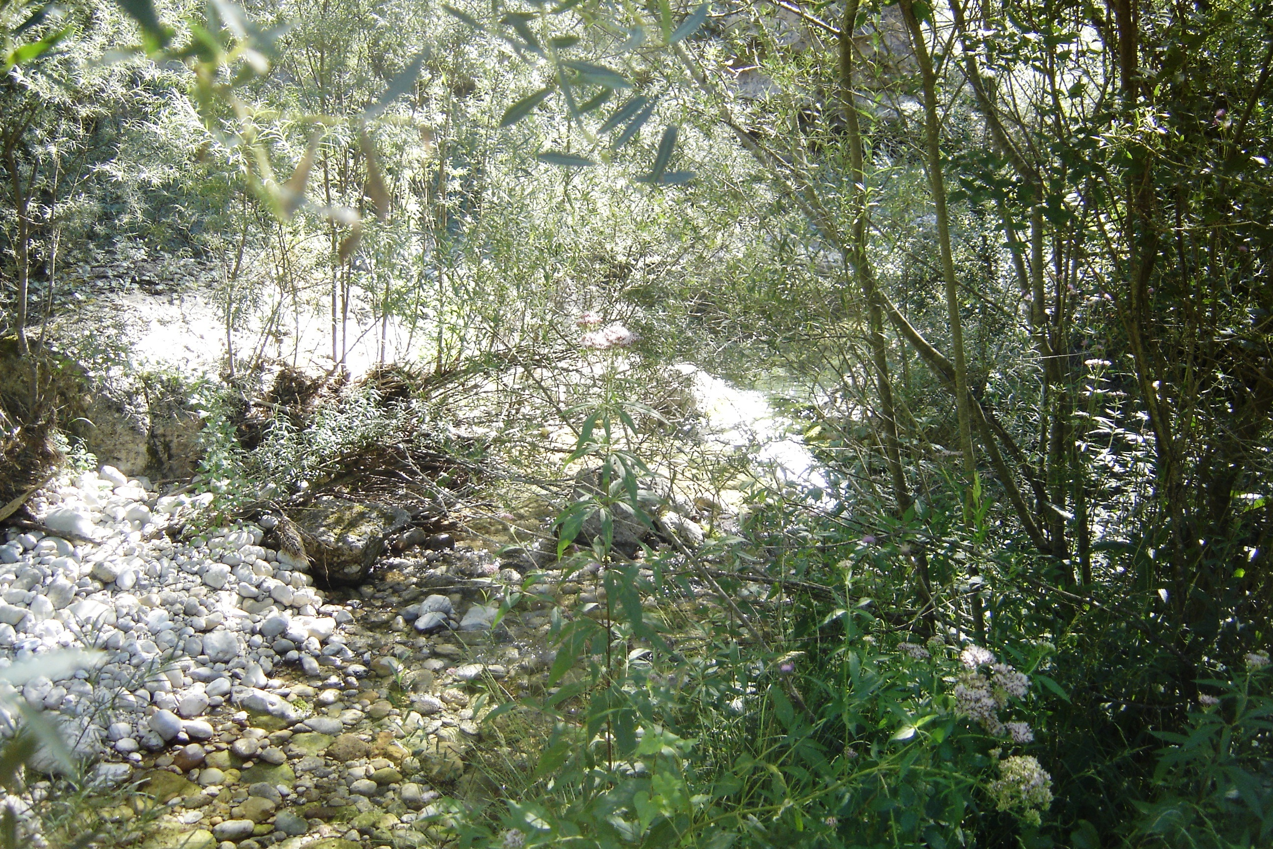 La confluència de la Riera de Canalda (esquerra) i el Torrent de Junyent (dreta) a Fonts Caldes.